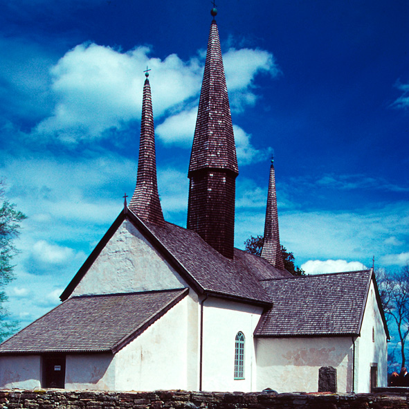 Kungslena kyrka Image taken by Wigulf